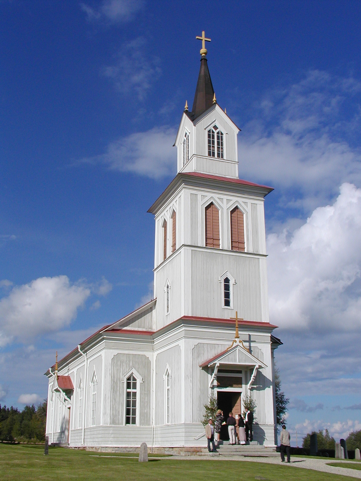 Åsarna gamla kyrka, byggd 1875-85.